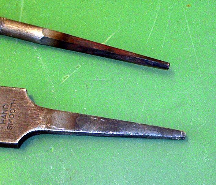 zelf gemaakte foto voor het publiek domein. Martink